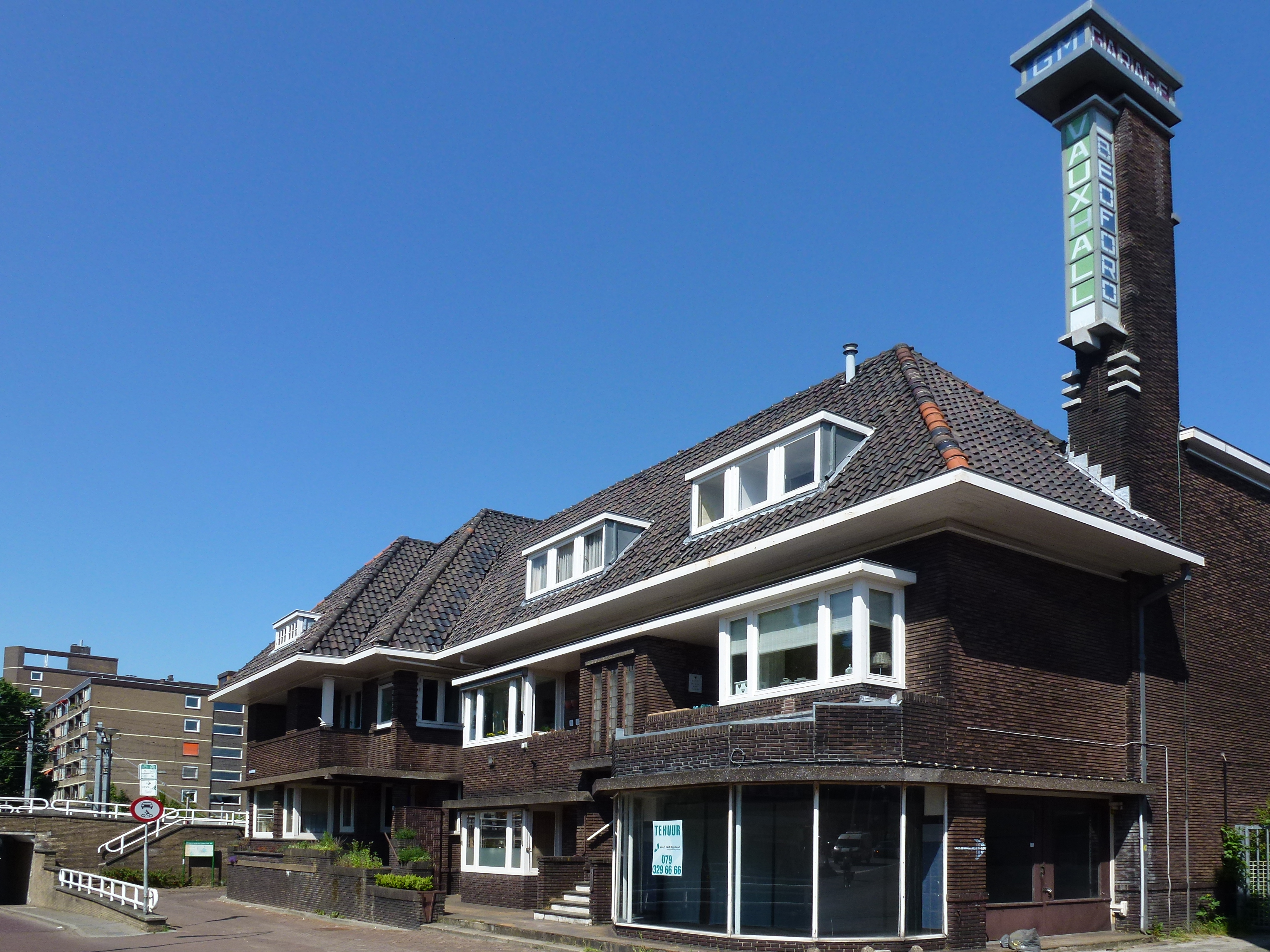 Voormalige garage met showroom en woningen uit 1933 van architect Dirk Stuurman.